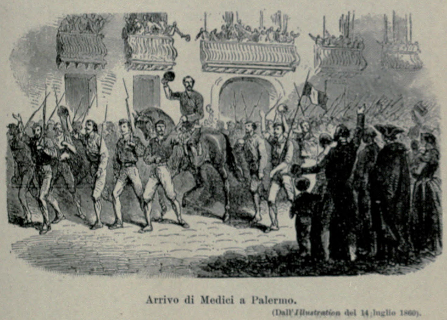 Ingresso in Palermo del generale Giacomo Medici e della sua colonna di volontari, nel giugno 1860.